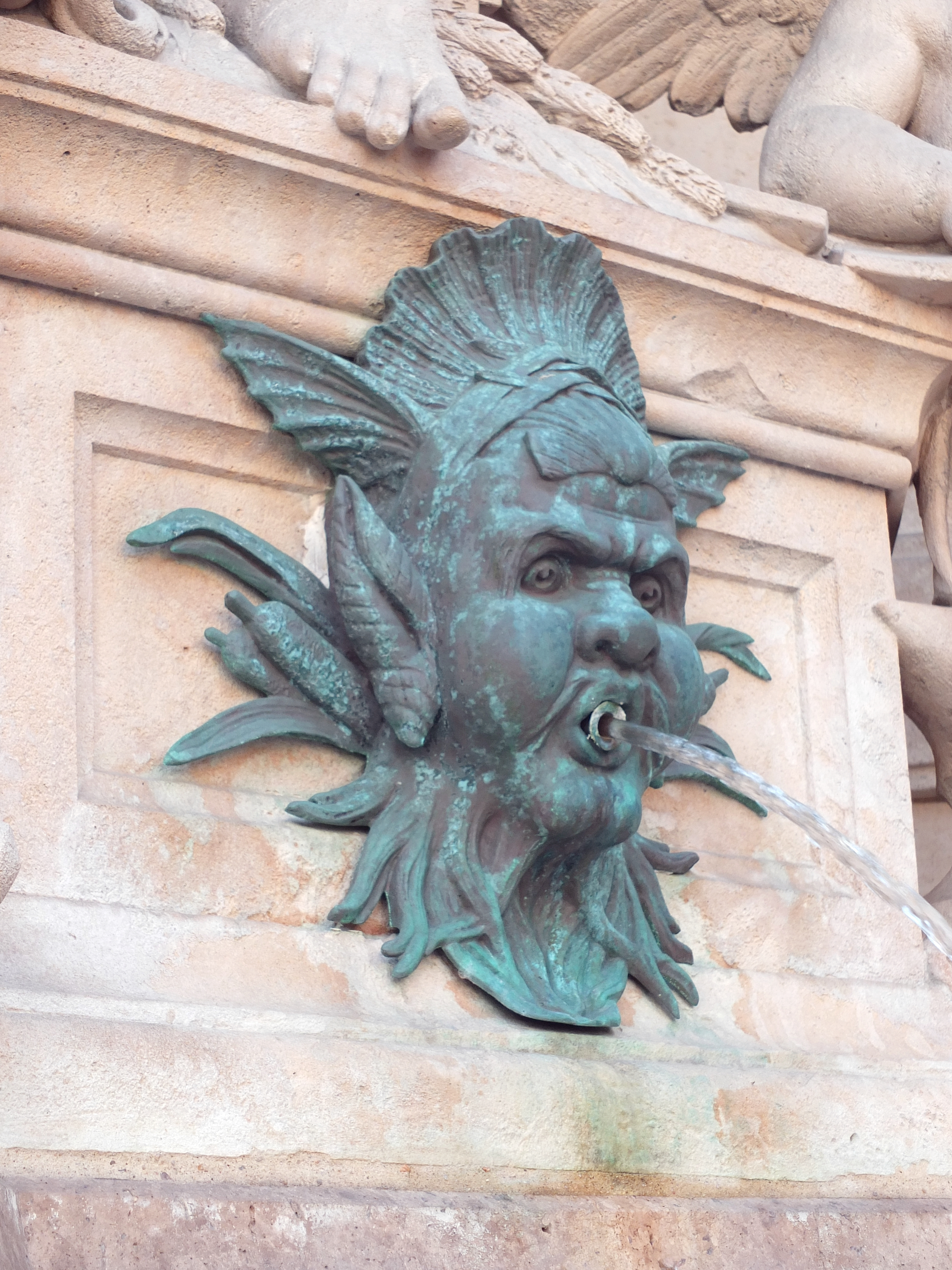 Fontaine dans la cour intérieure de l'Hôtel Cail (mairie du 8e arrondissement de Paris), rue de Lisbonne. Architecte et sculpteur, Pierre-Émile Charrier (1865) - Mascaron central en bronze.